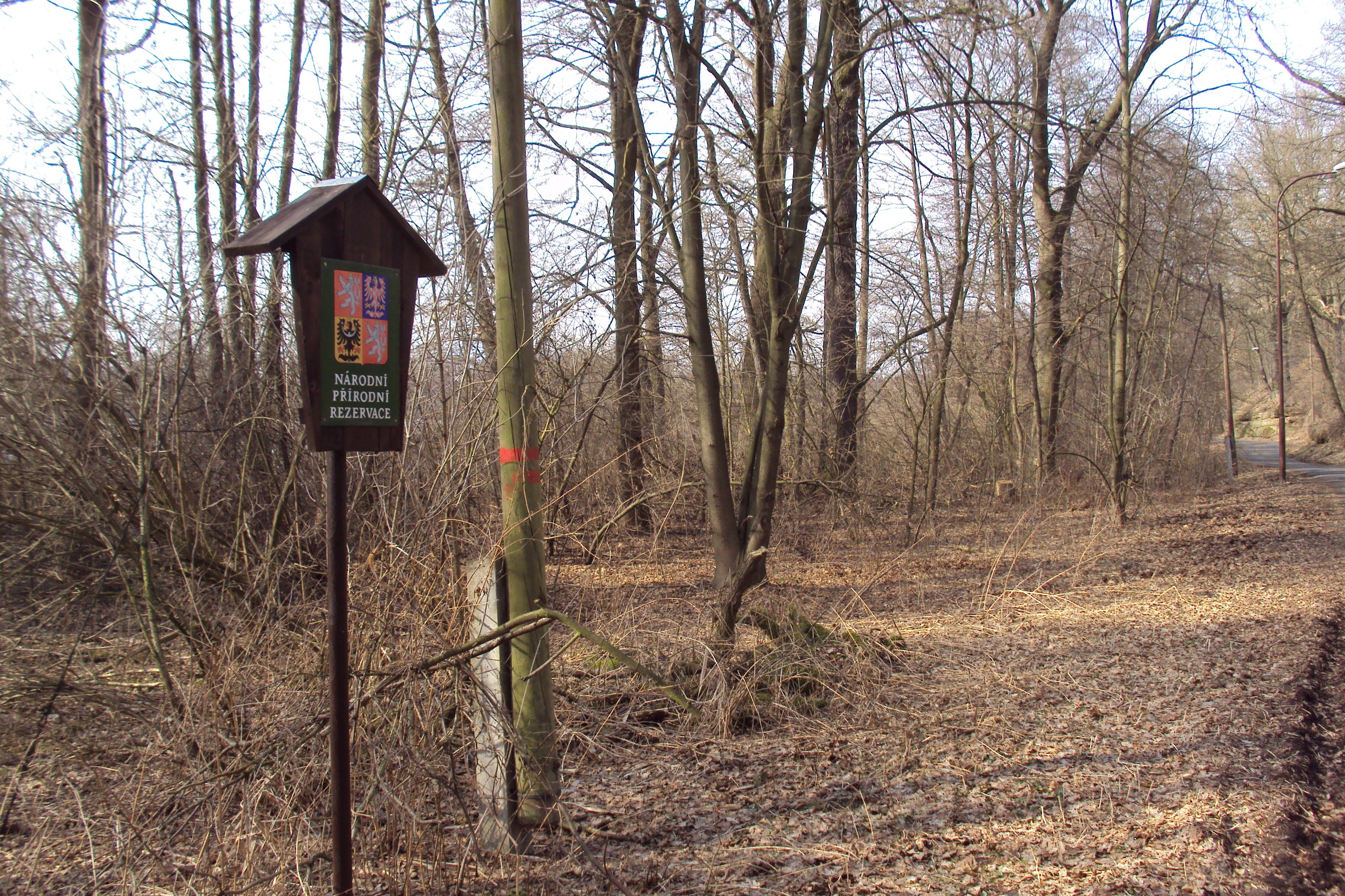 Rezervace je u obce Zahrádky na Českolipsku na katastru vzdálené obce Zahrádky